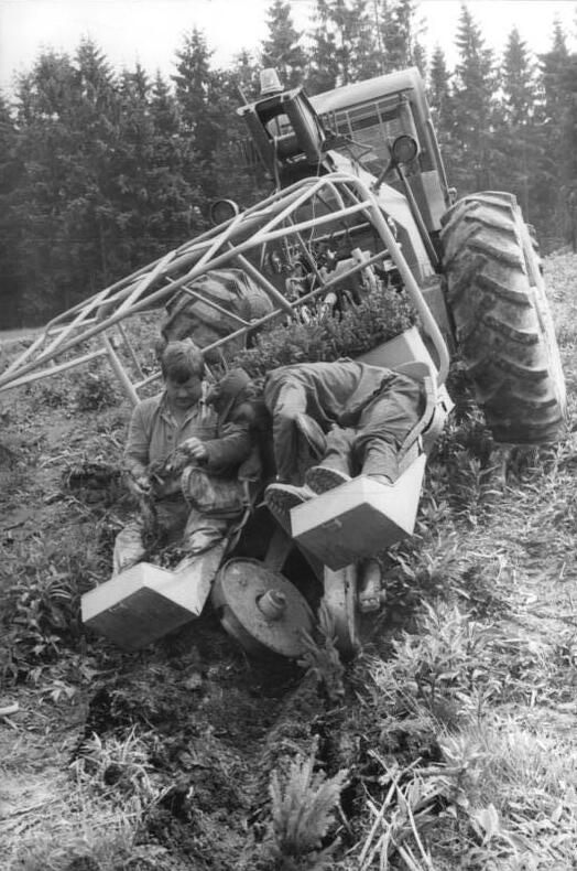 Sangershausen, Aufforstung ADN-ZB Lehmann 10.6.1987 Bez. Halle: Schadholzaufarbeitung- Zeitgleich mit der Schadholzaufarbeitung begannen die Kollektive des Staatlichen Forstwirtschaftsbetriebes Sangershausen in ihren Jagen mit der Aufforstung. Auf 40 Hektar brachten sie mit der im eigenen Rationalisierungsmittelbau entwickelten Pflanzmaschine mehr als 4.000 Fichtenpflanzen in den Boden. (siehe 10N)